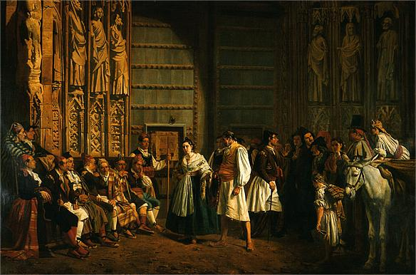 El tribunal de las aguas de Valencia. Cuadro de Bernardo Ferrándiz (1835-1885) pintando en 1865.